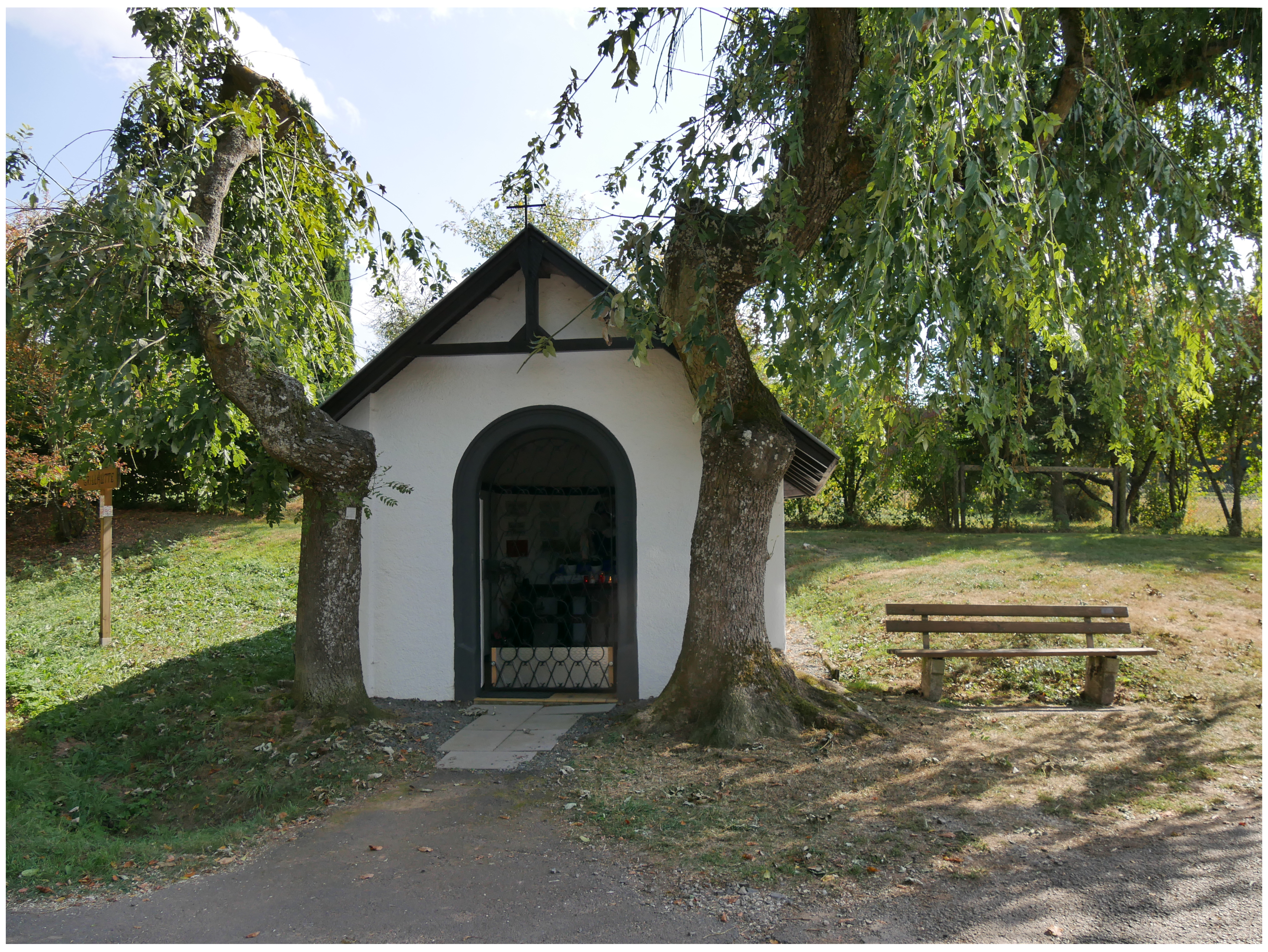 Wegekapelle (Gusenburg) südlich des Ortes